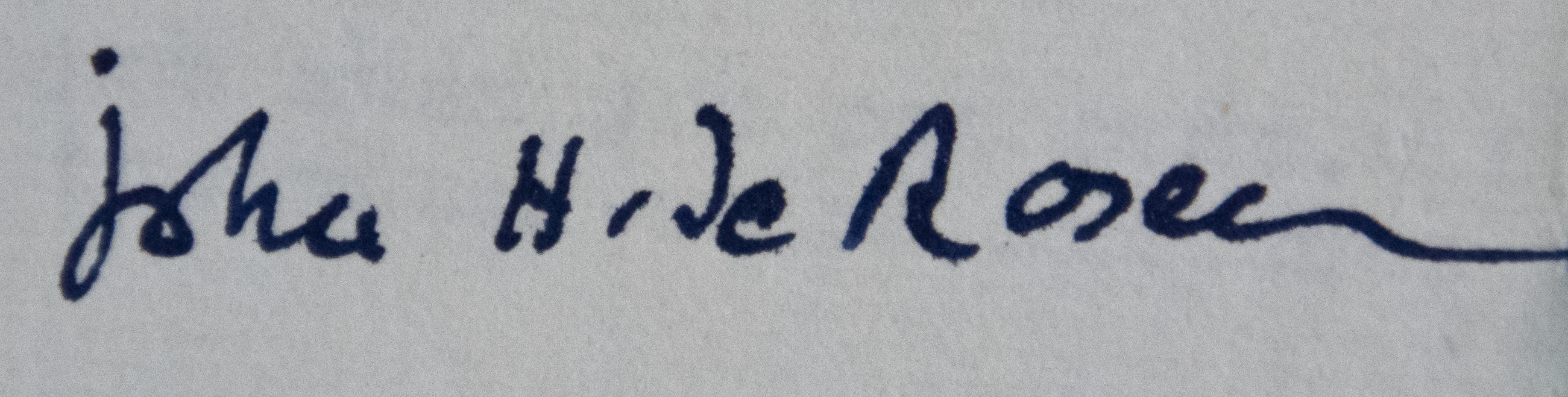 Unterschrift, Jan Henryk Rosen